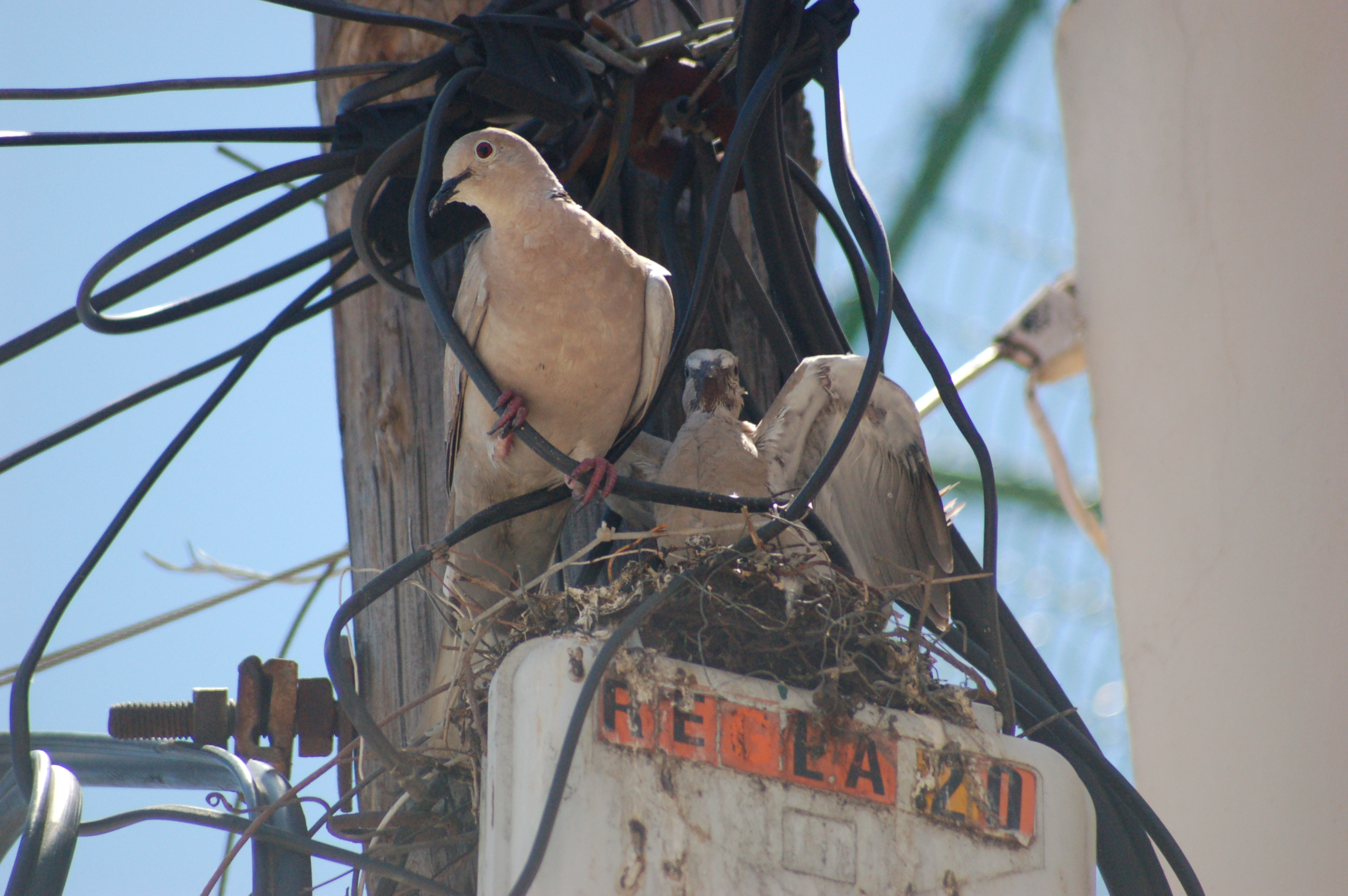 Palomas anidando en una caja de pares telefonicos